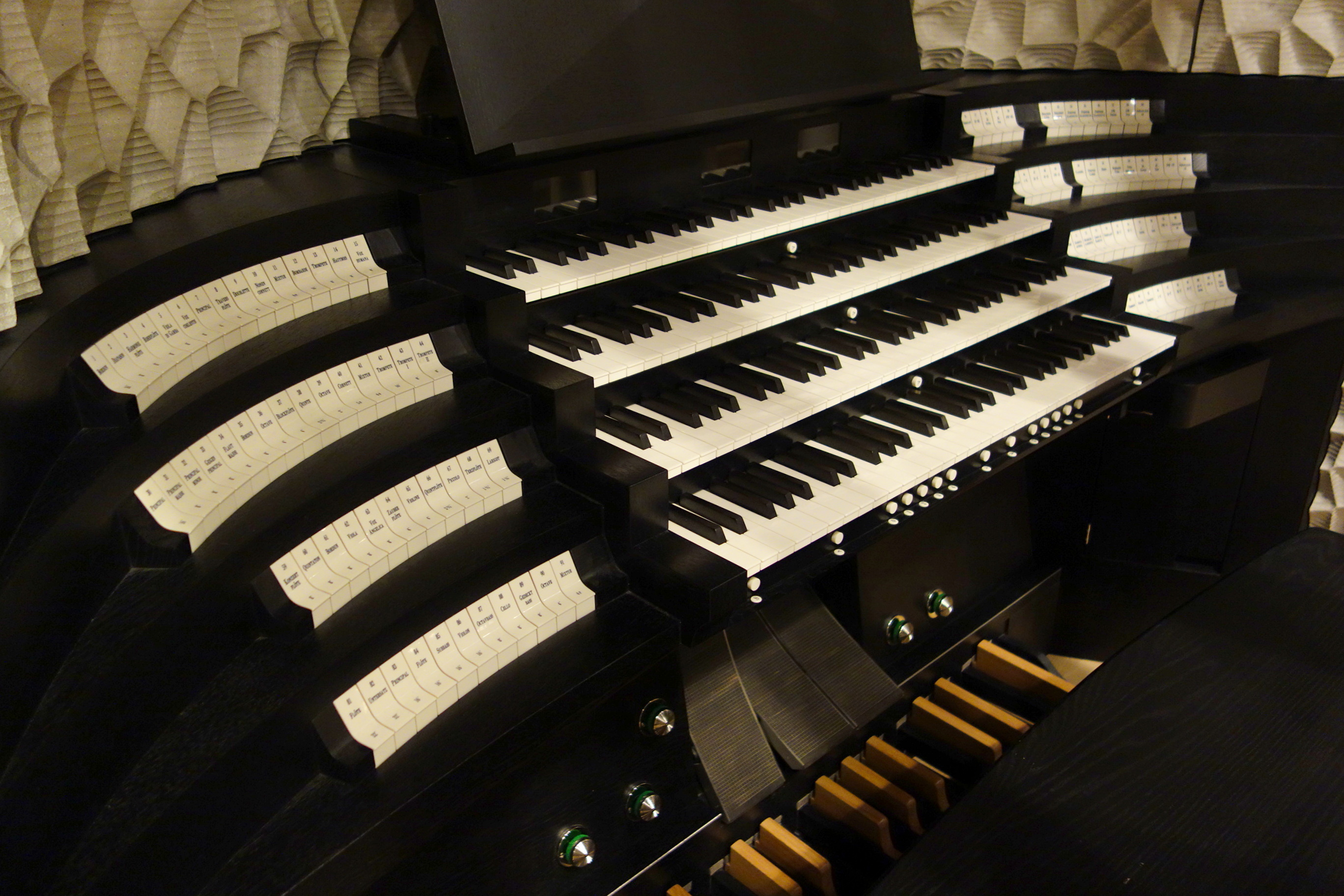 Spieltisch der Orgel in der Elbphilharmonie, Hamburg, Deutschland